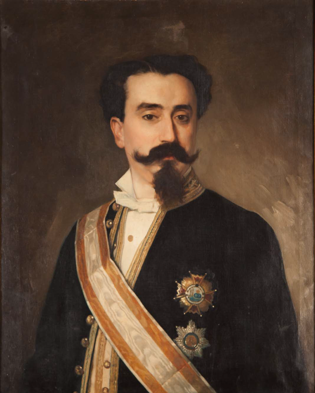 Retrato de Salvador López Guijarro, óleo sobre lienzo, 72 x 58,5 cm, colección Antoni Miró, Alcoy